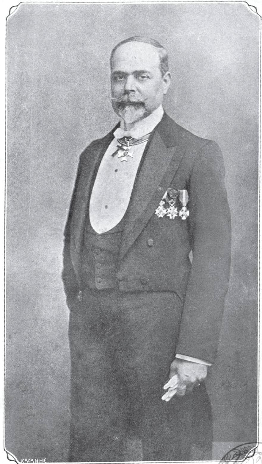 griechischer Bänker, 19.-20. Jahrhundert